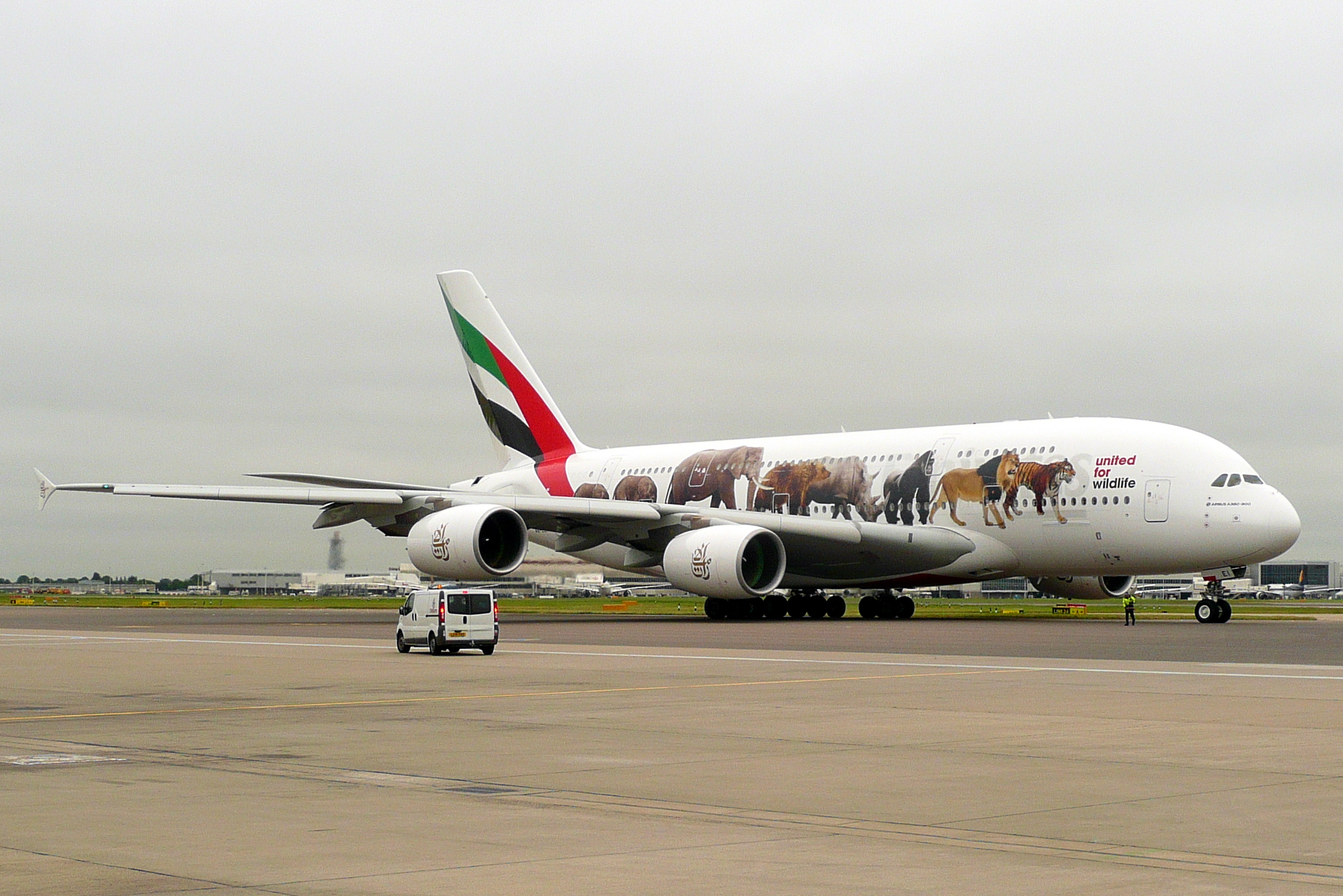 A6-EEI 03062016LHR